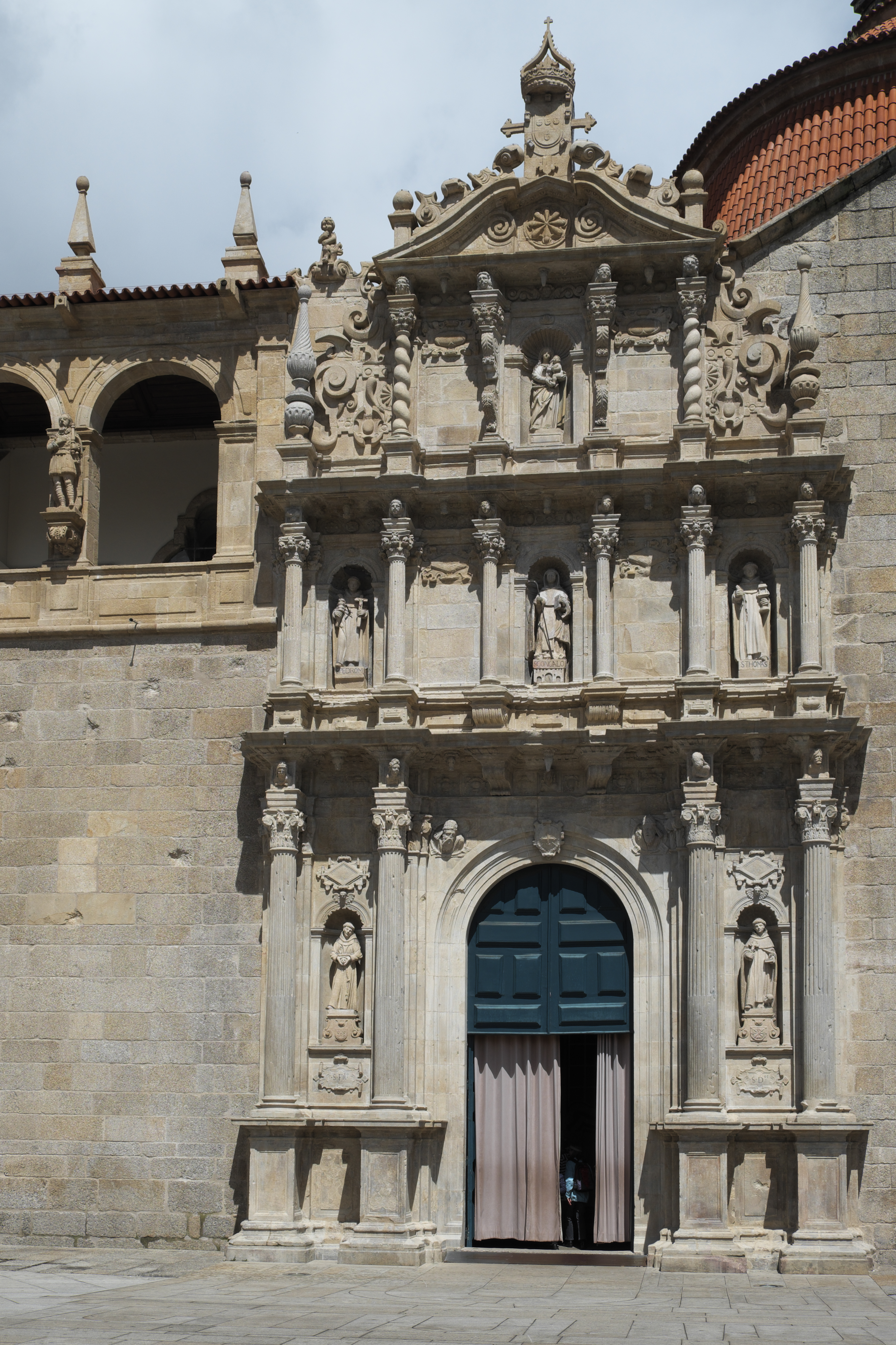 Klosterkirche São Gonçalo in Amarante im Distrikt Porto (Nordportugal), Fassade